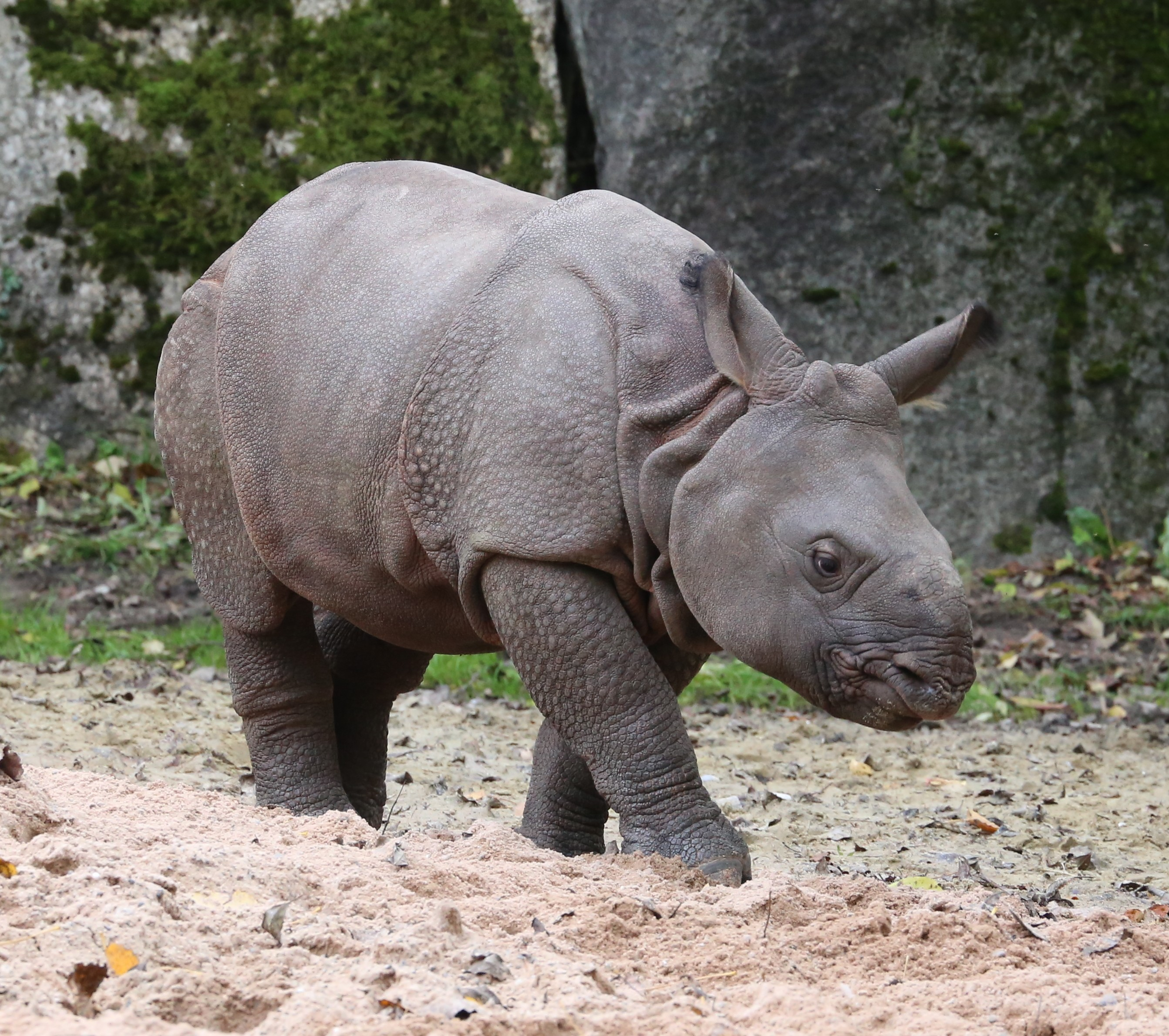 Puri, geb. am 31. August 2015, junges Indisches Panzernashorn (Rhinoceros unicornis), Tierpark Hellabrunn, München